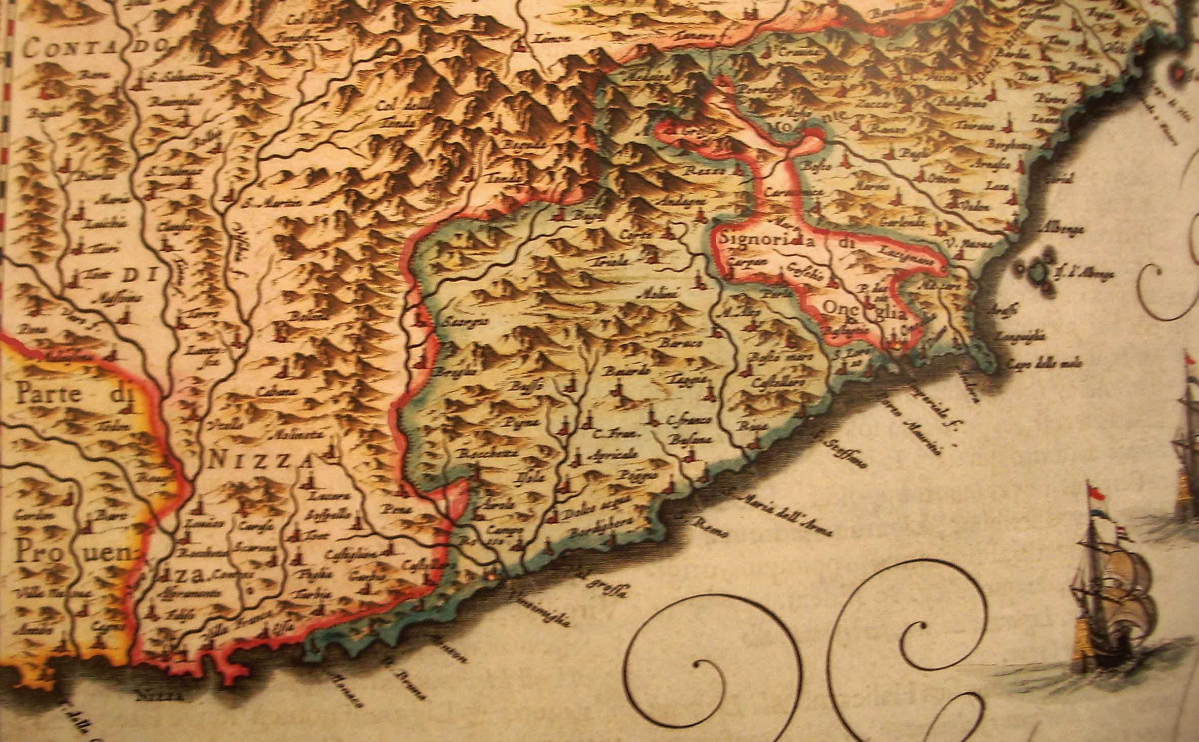 Les territoires maritimes de la Maison de Savoie: Le Comté de Nice et Oneille représentés dans l'Atlas Maior de Joan Blaeu en 1664.